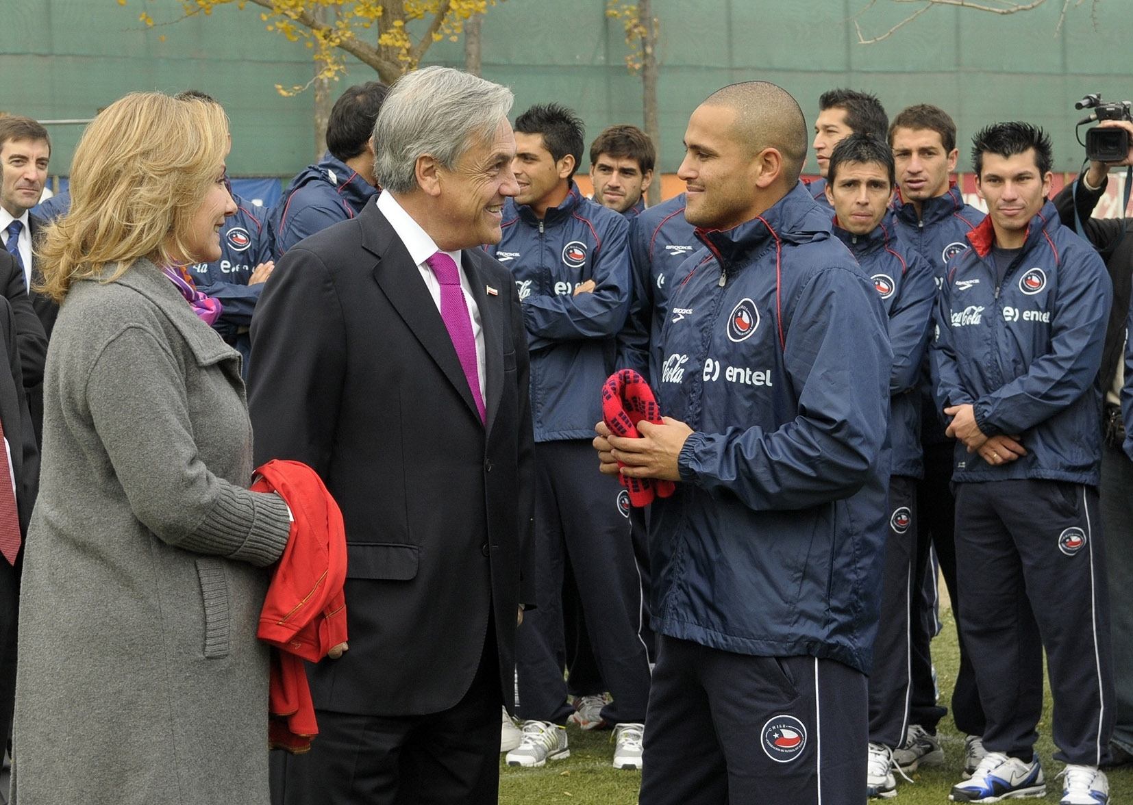 3 de junio de 2013. Despedida en Juan Pinto Durán de la Selección chilena que va rumbo al Mundial de Sudafica 2010: En primer plano Cecilia Morel, Sebastián Piñera y Humberto "Chupete" Suazo.